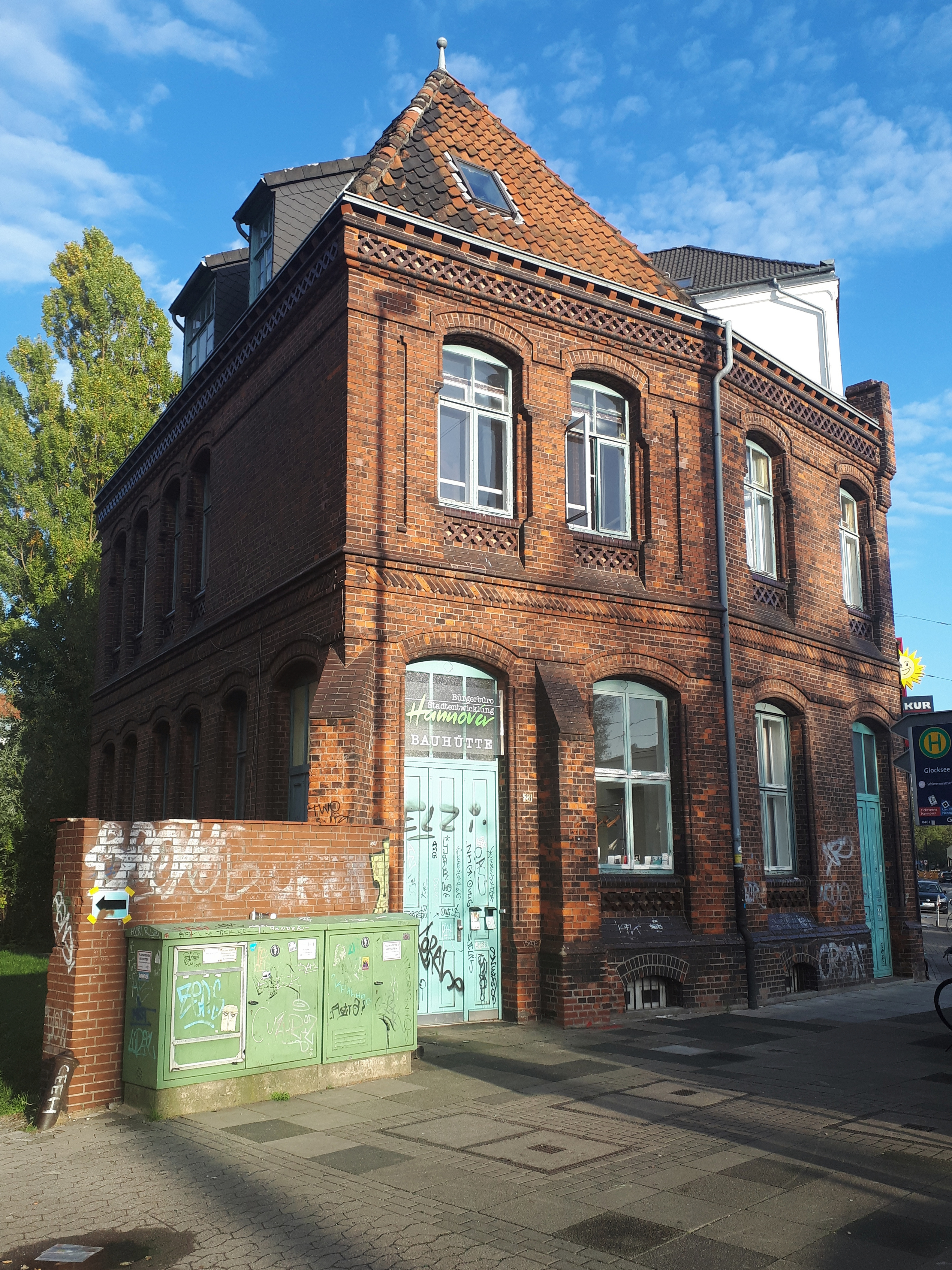 Der Sitz vom Bürgerbüro Stadtentwicklung Hannover, Braunstraße 28, 30169 Hannover, D